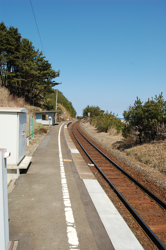 有家駅ホームより撮影